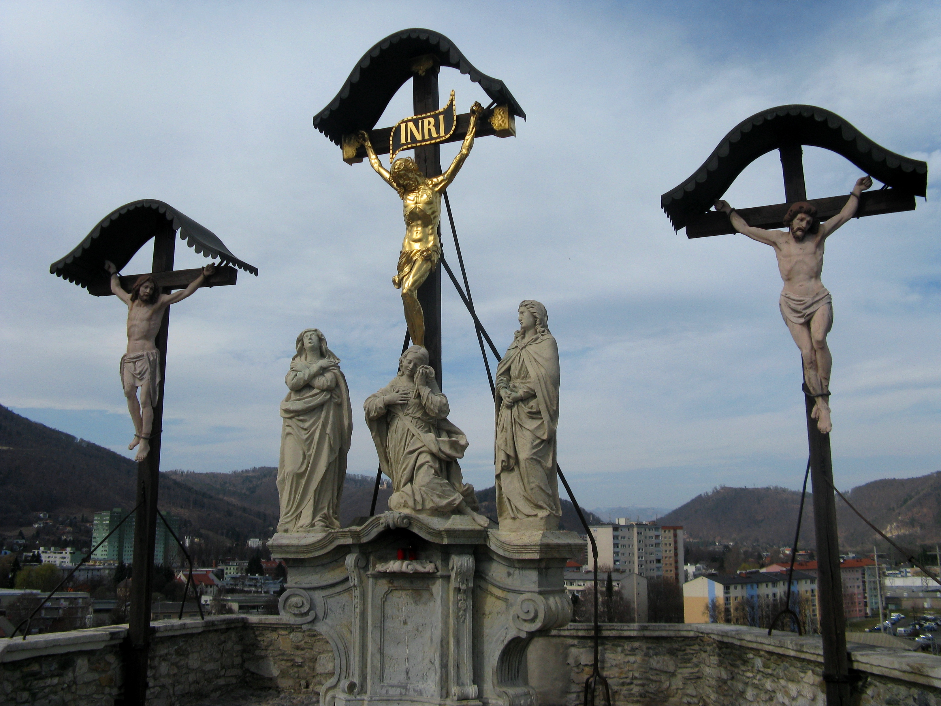 Grazer Kalvarienberg, Gesamtansicht Kreuzigungsgruppe